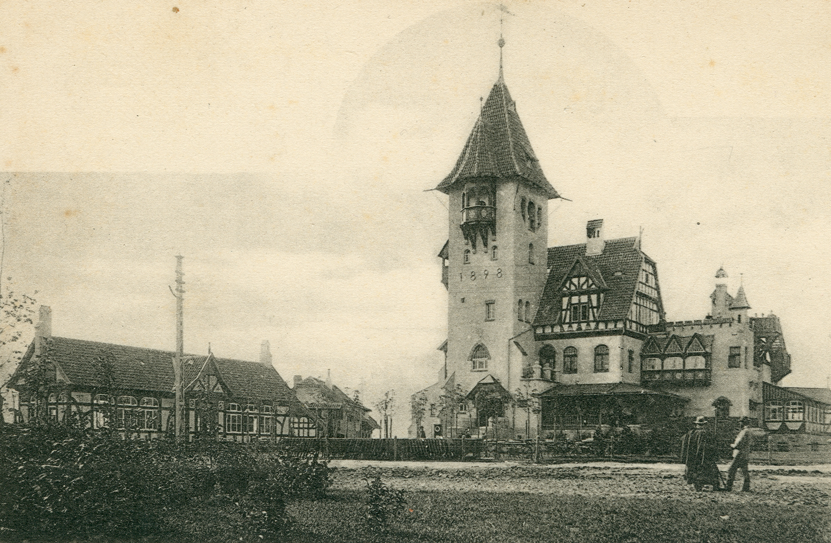 Ansichtskarte Nummer 541 mit dem Berggasthaus Niedersachsen bei Gehrden. Deutlich ist an dem ehemaligen Aussichtsturm auf dem Gehrdener Berg das Baujahr 1898 zu erkennen.